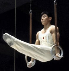 Takuji Hayata